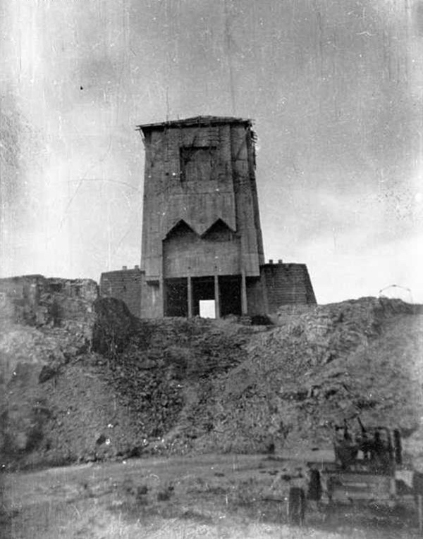 1945年香港興建中的忠靈塔